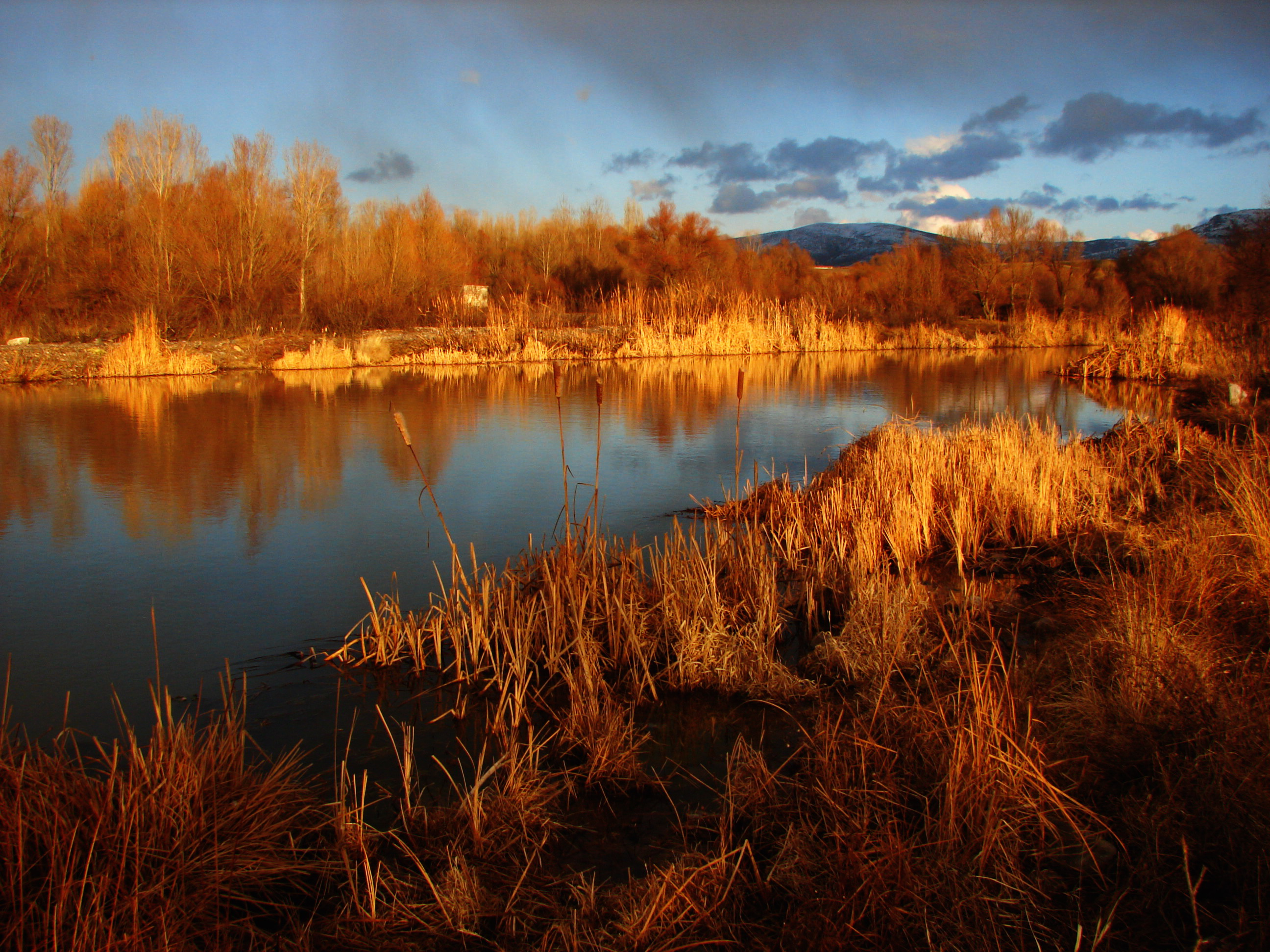 Güdül Ankara